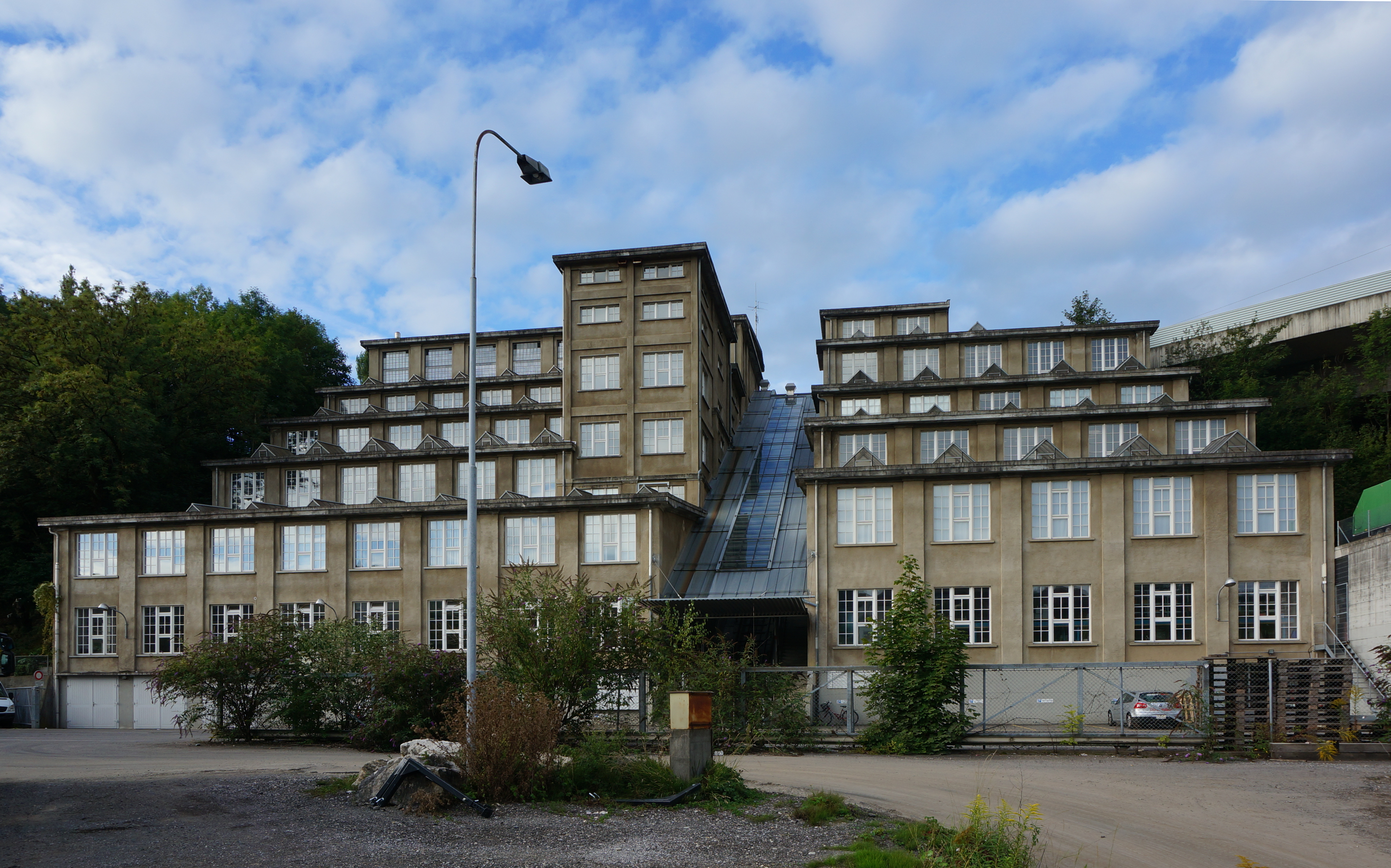 Stufenbau (ehemalige Nitrozellulosefabrik)